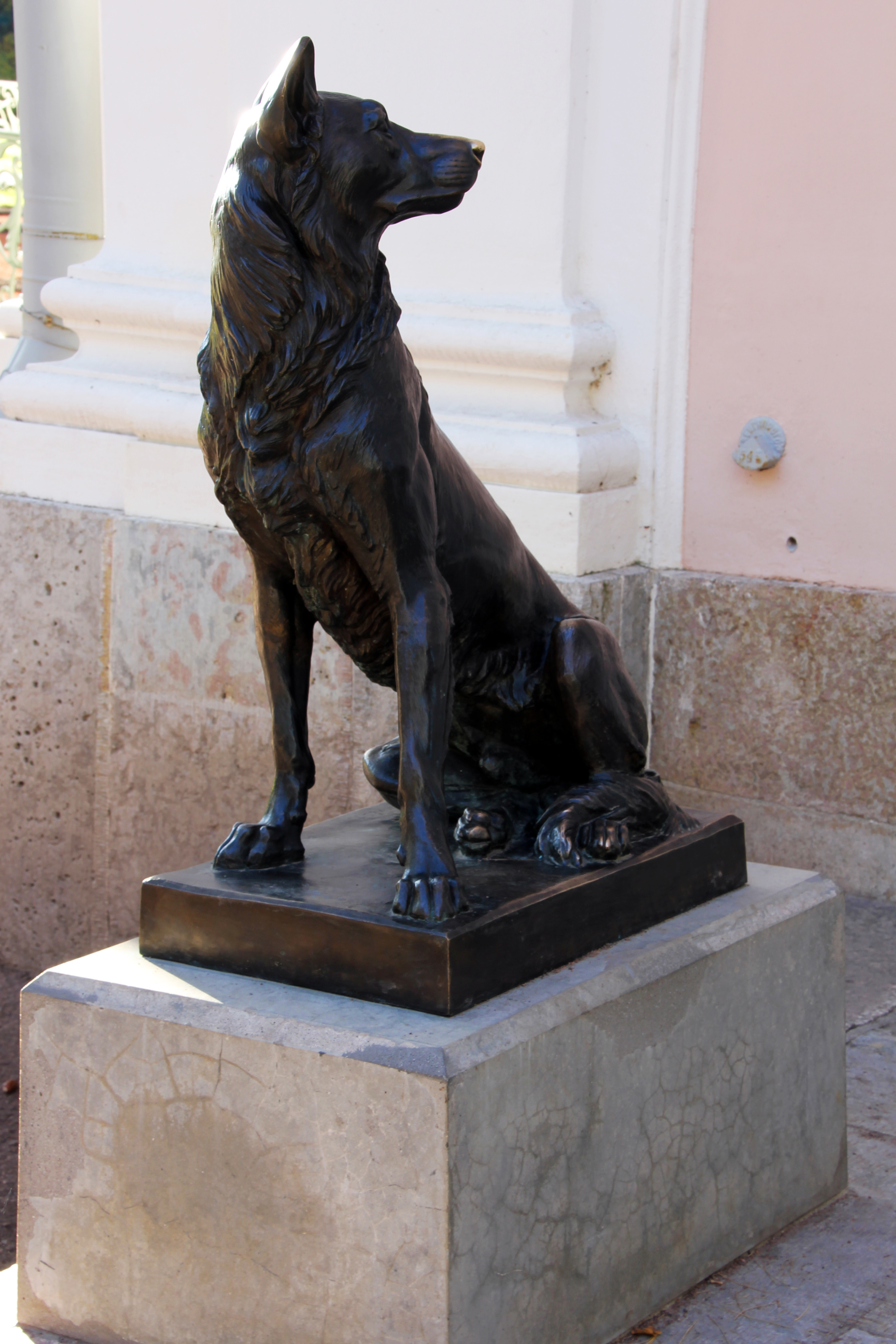 Скульптура Собака (две статуи): восточное крыло Китайского дворца, Ломоносов, Петродворцовый район, Санкт-Петербург